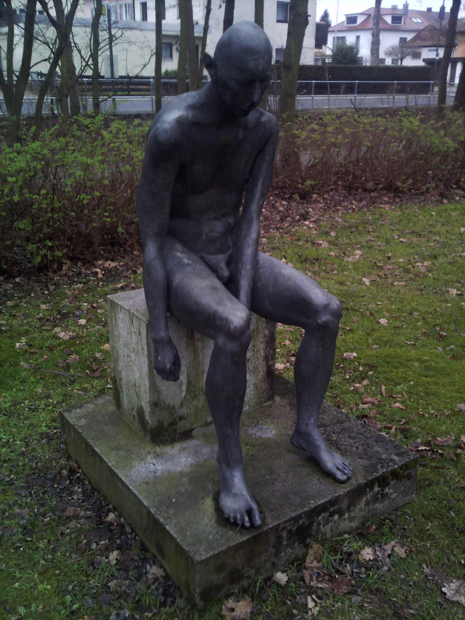 Die Skulptur Schiller vor dem Neubau des Fridericianum in Erlangen